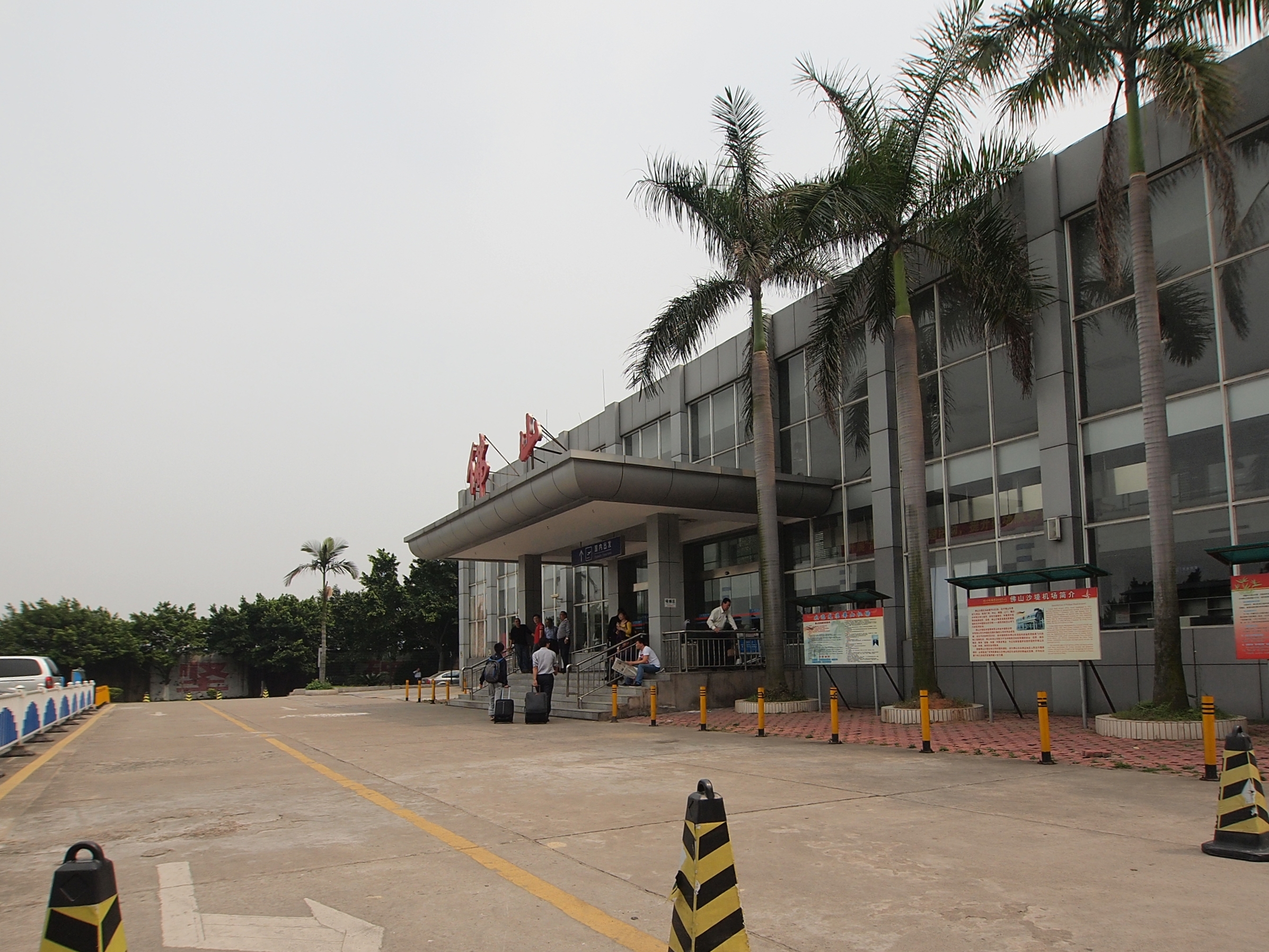 佛山沙堤机场 - Foshan Shadi Airport - 2012.04